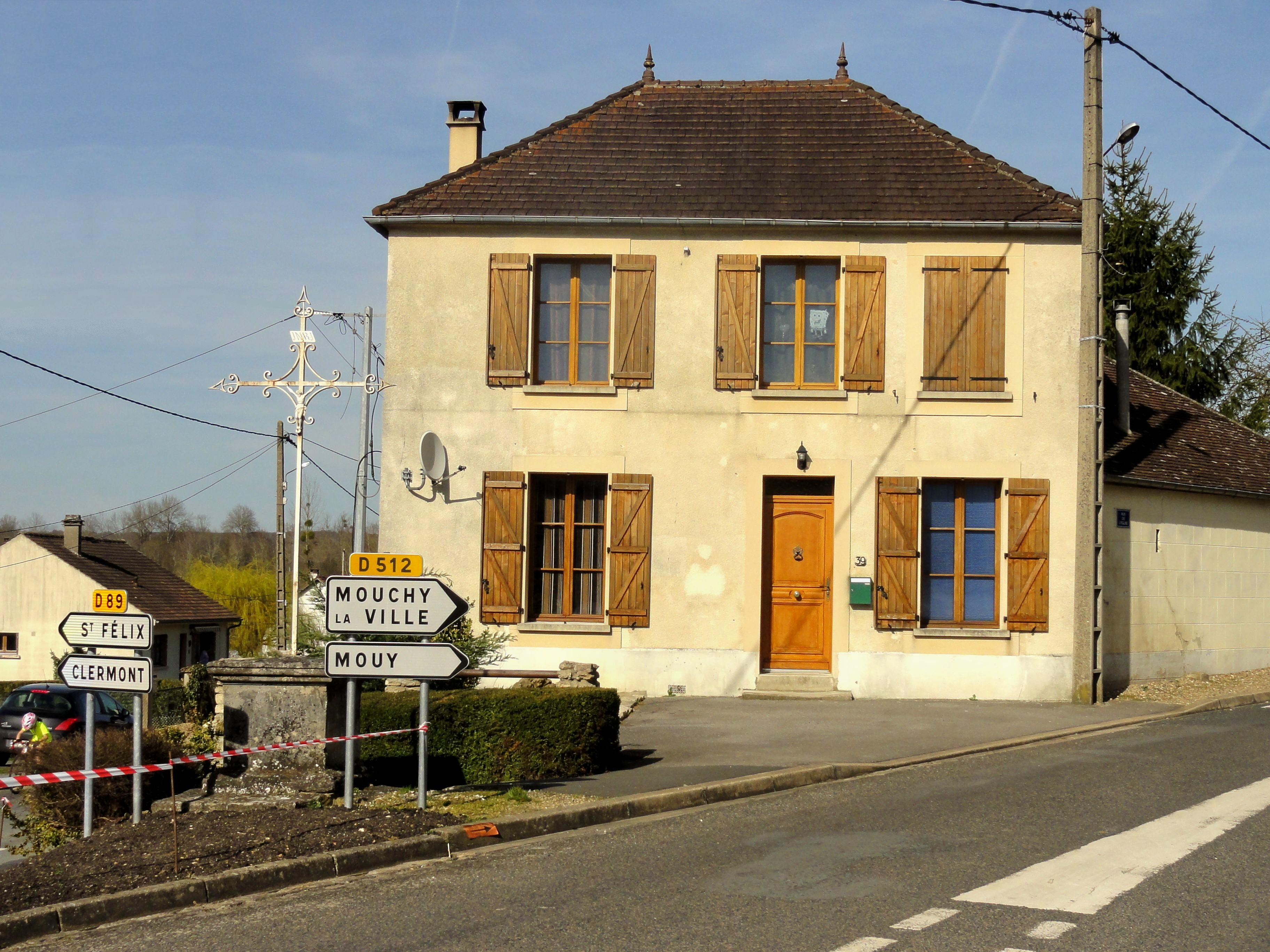 Rue de l'Église, au carrefour avec la rue de Péronne.